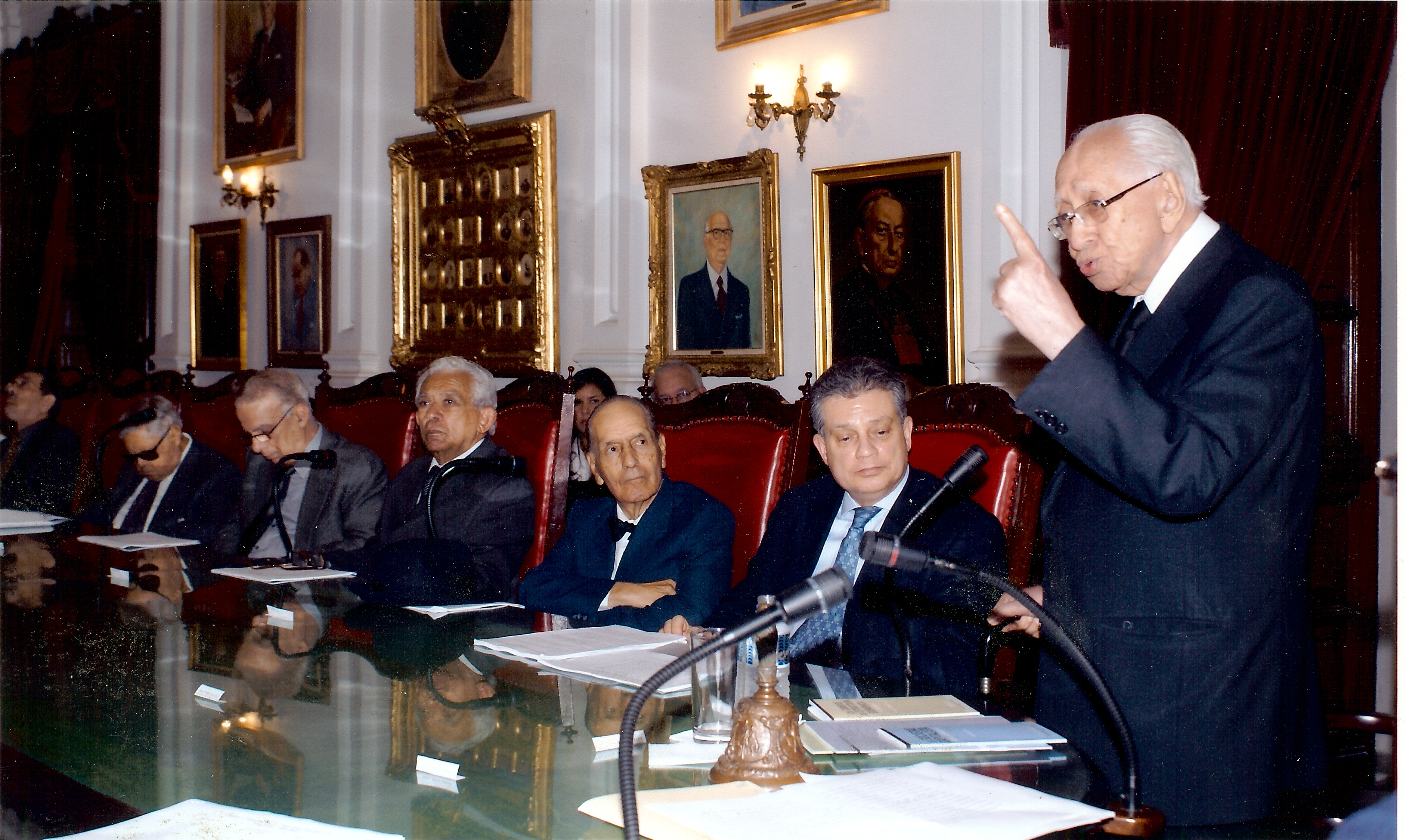 El Dr. Ramón J. Velásquez en una sesión de la Academia de la Historia